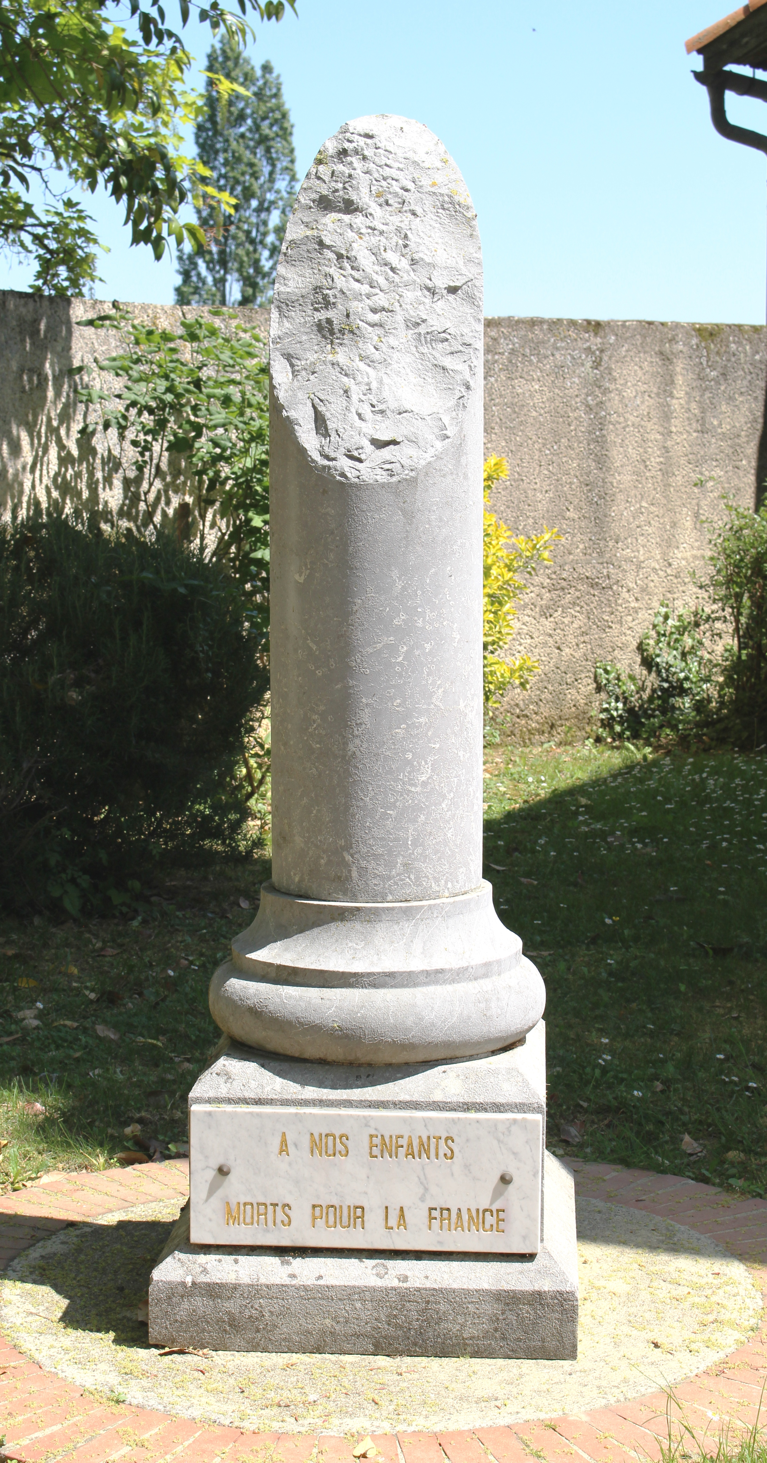 Monument aux morts de Collongues (Hautes-Pyrénées)